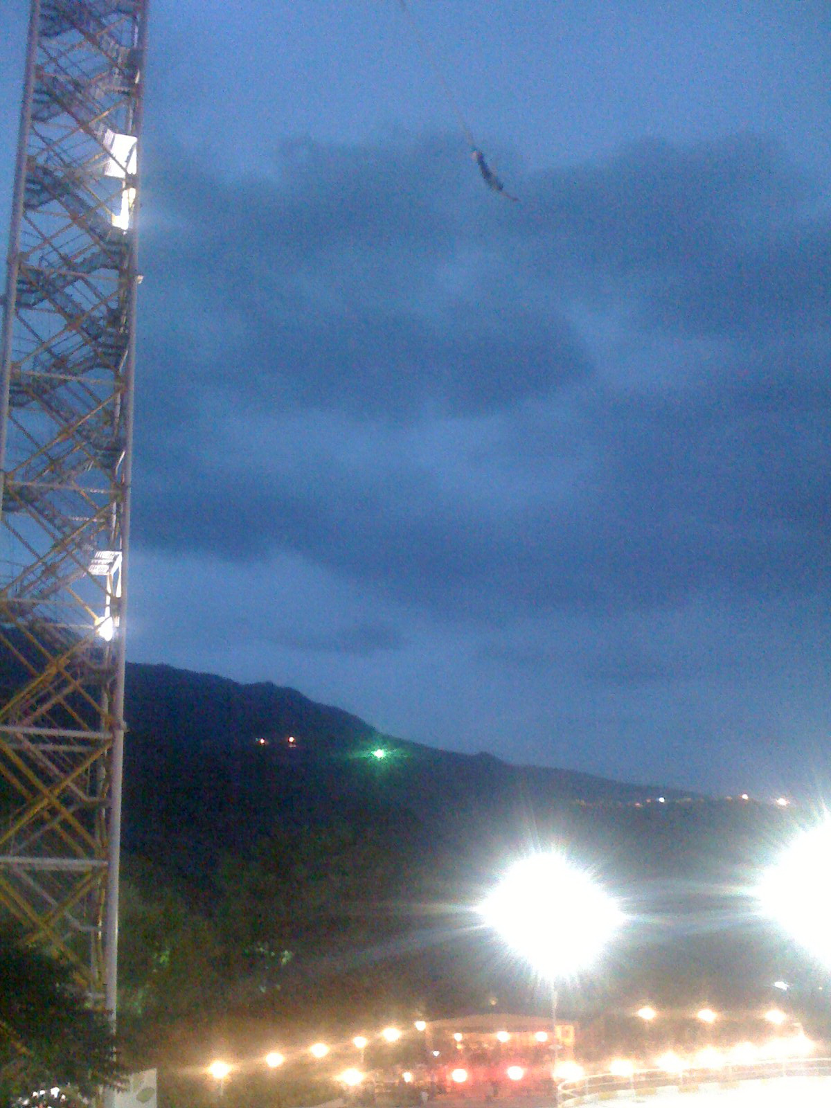 این عکس توسط اینجانب و از بام‌تهران، تهران، ایران می‌باشد. تاریخ گرفته‌شدن ۱۴/۰۳/۱۳۸۷ می‌باشد و توسط Iphone با دوربین ۲ مگاپیکسل گرفته شده‌است.